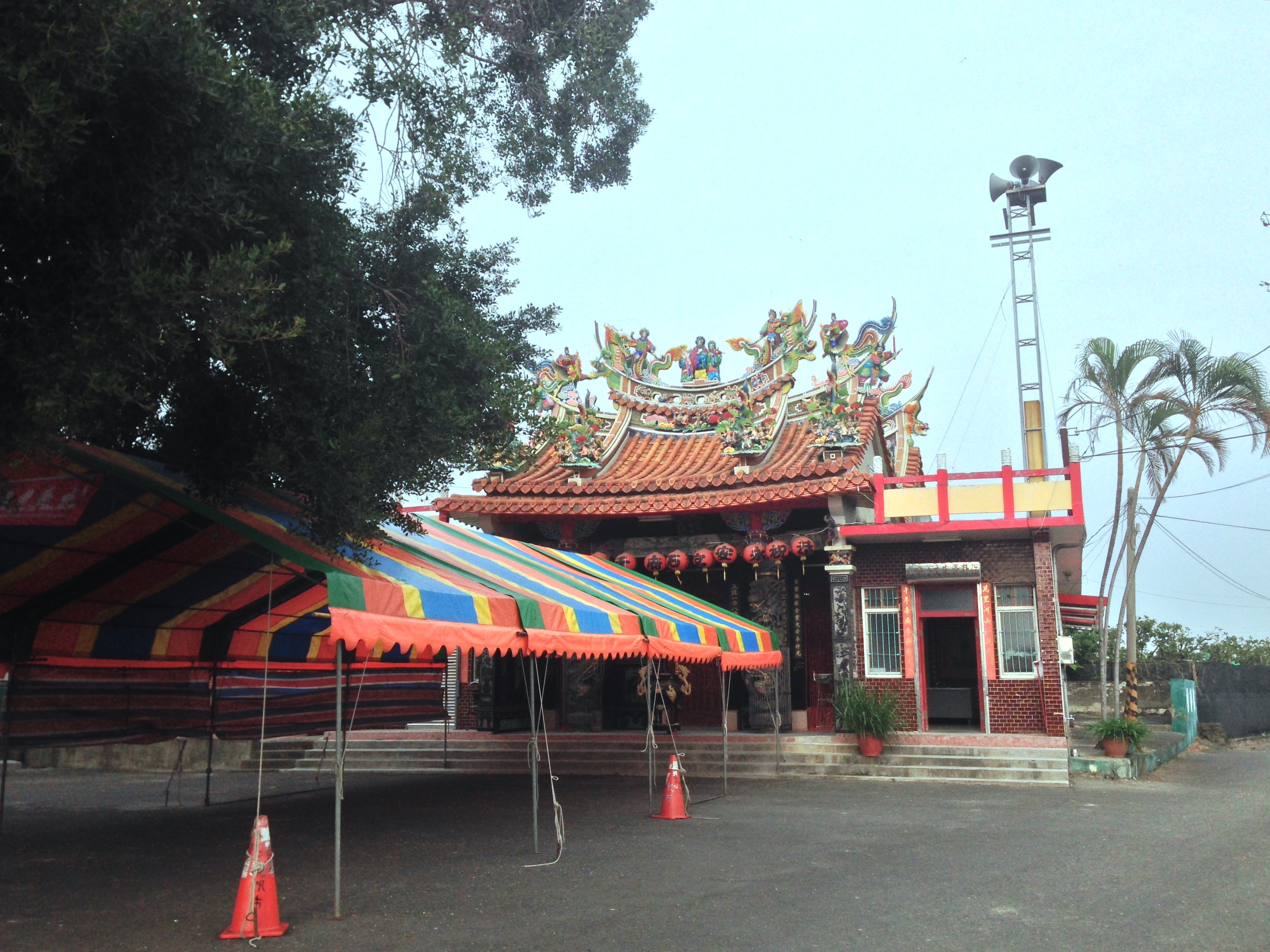 中文（台灣）: 搭棚架設宴的加輦邦永安宮